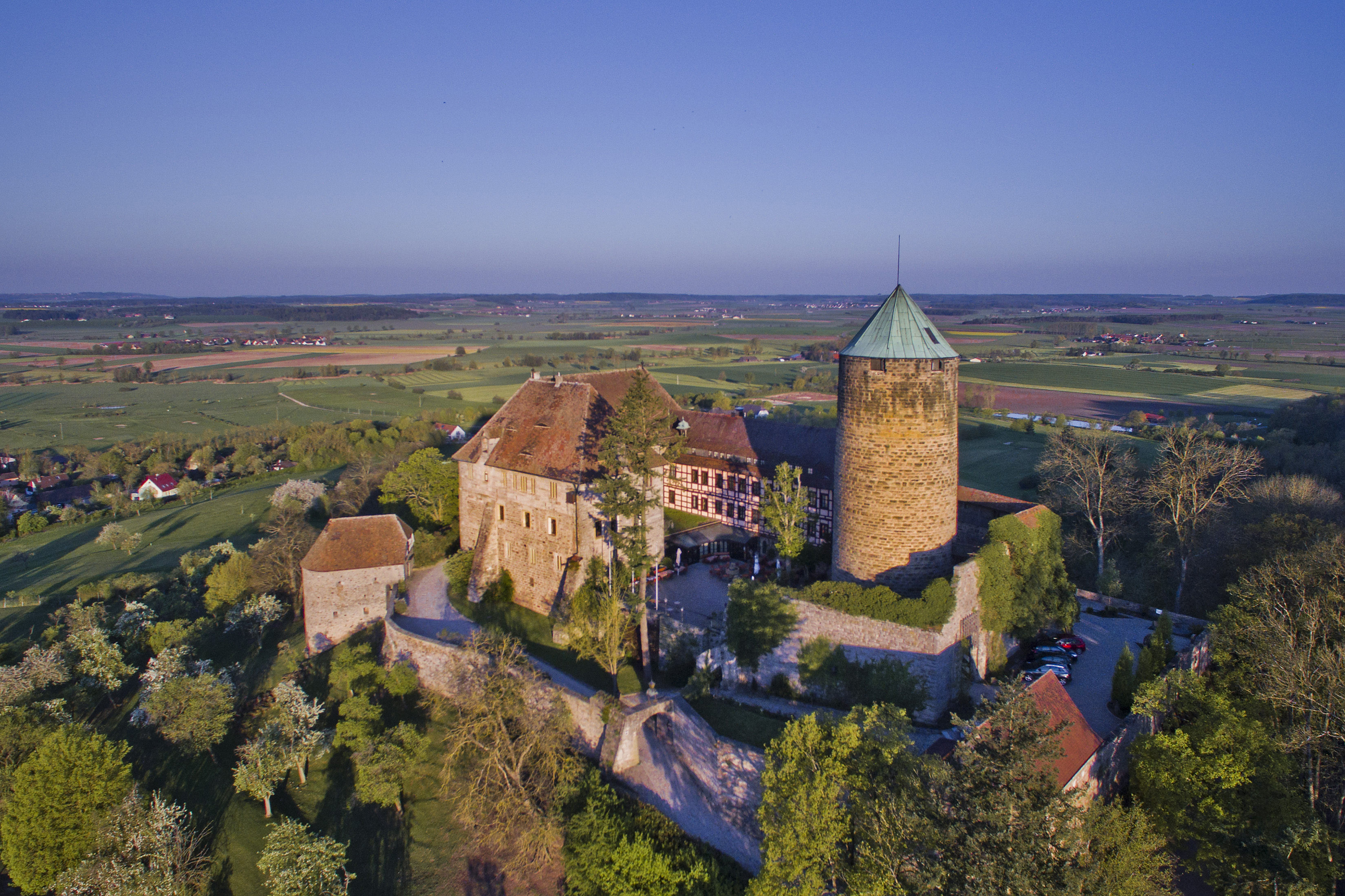 Burg Colmberg aus der Vogelperspektive